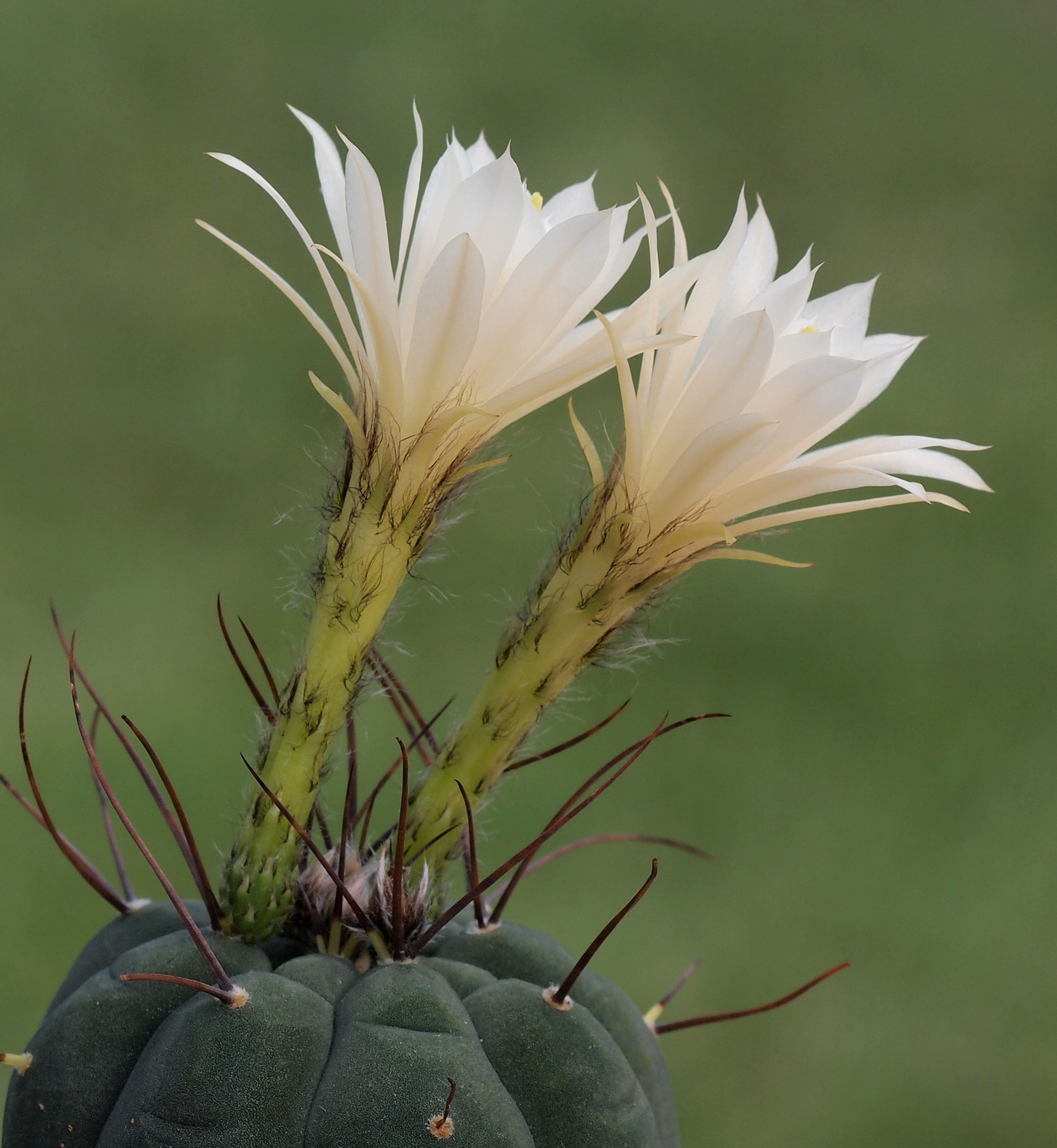 Matucana madisoniorum albiflora